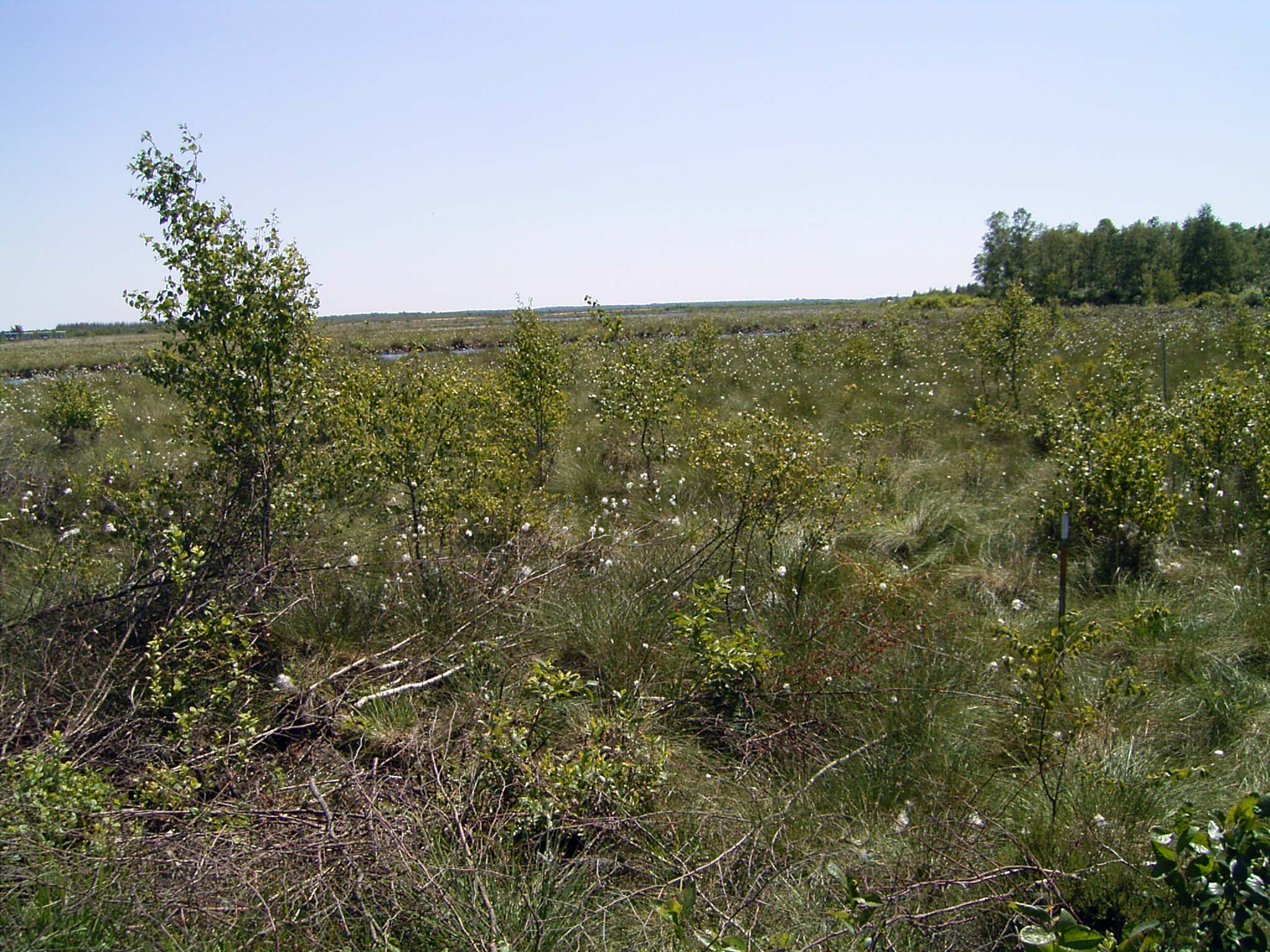 Verbuschte Renaturierungsfläche (mit Betula pubescens, Eriophorum vaginatum), Goldenstedter Moor (Niedersachsen)